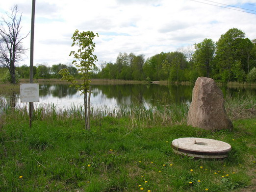 Obeliškiai. Buv. dvaro tvenkinys Foto: Algirdas, 2006 m. gegužės 17 d.